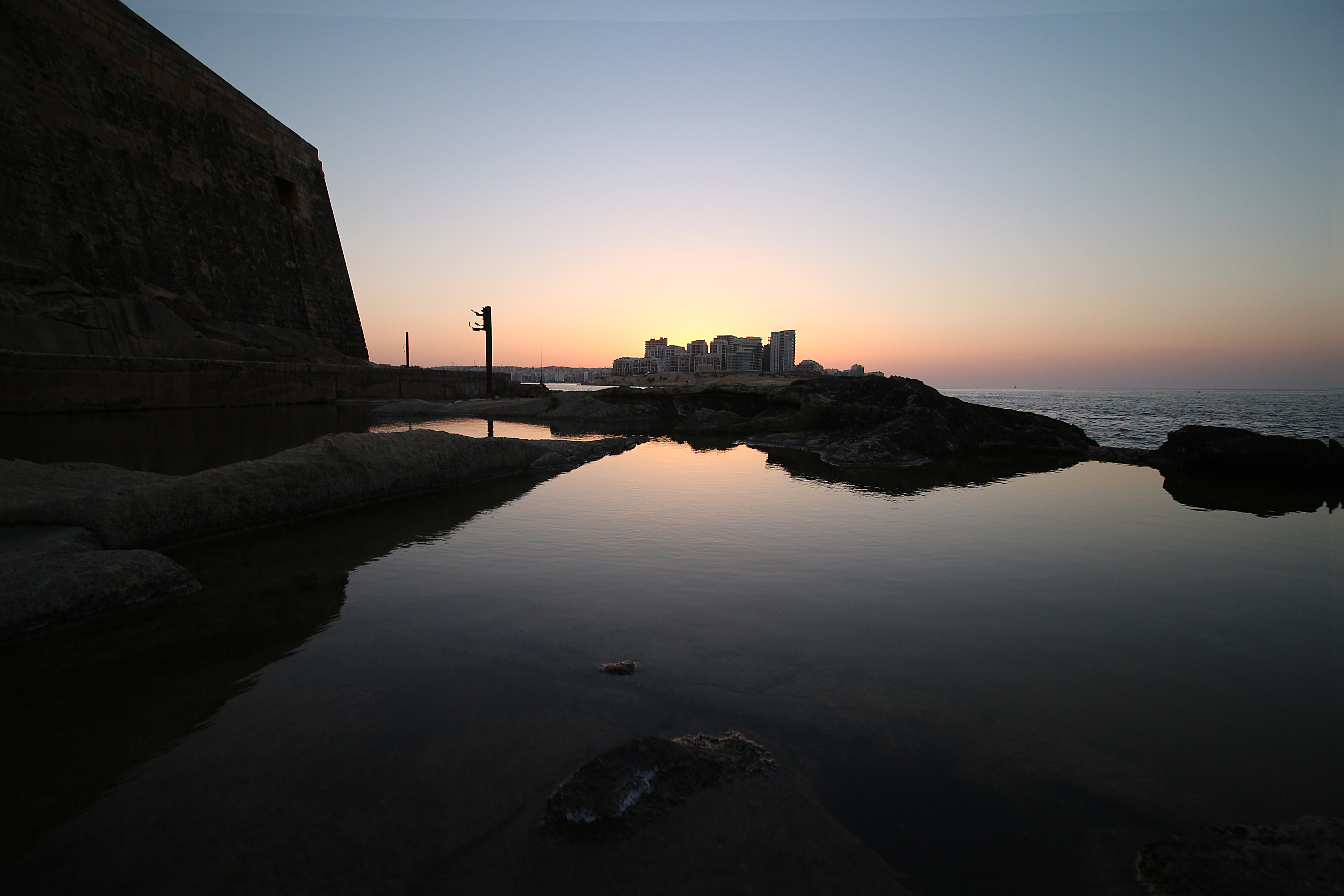 Tigne Point Malta